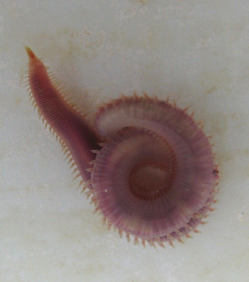 Glycera convoluta, Annélide polychète dans son attitude lovée caractéristique